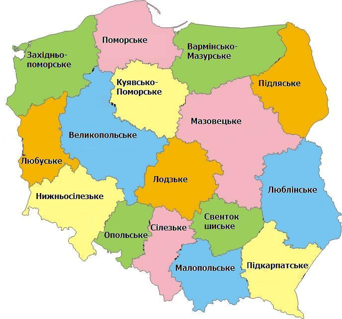 Мапа Польщі українською мовою